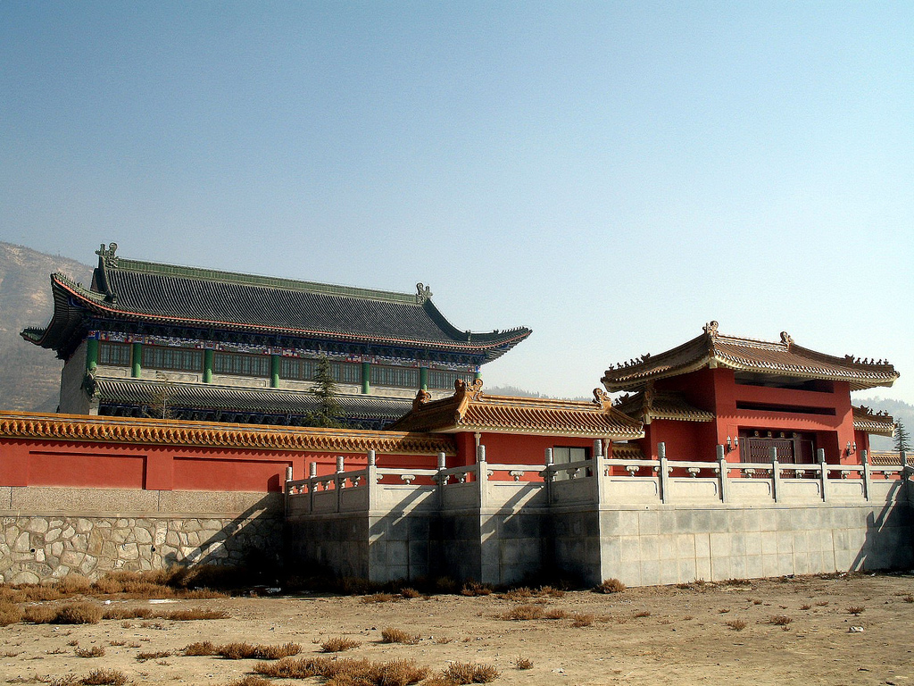 山顶上平出了很大一片空地，建筑修建得很气派！